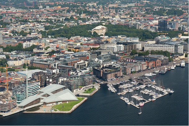 Tjuvholmen, Oslo, flyfoto fra sørøst, med Astrup Fearnley Museet nærmest parken